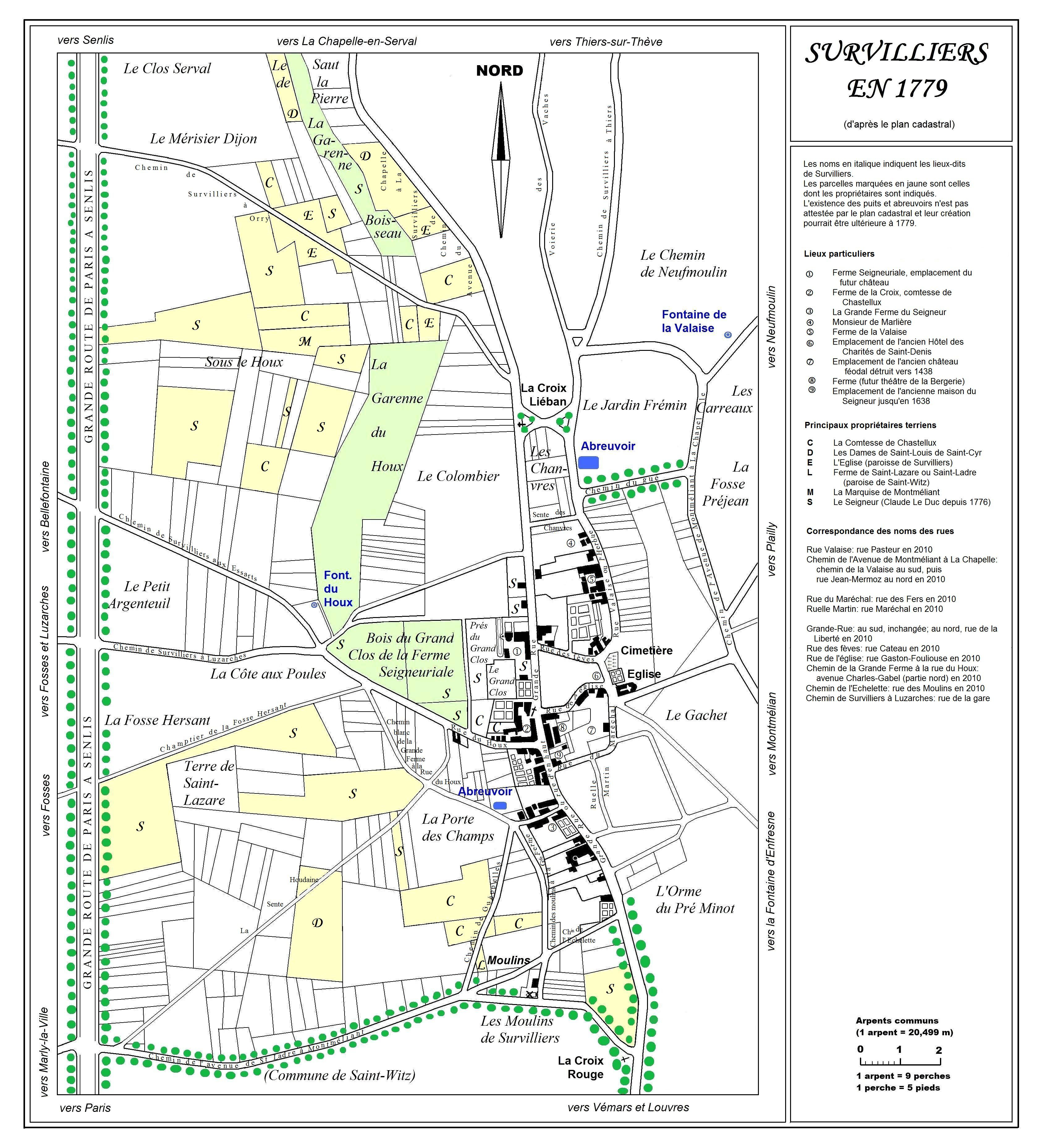 Plan de Survilliers en 1779, d'après le premier plan cadastral de 1779, avec lieux-dits et noms des chemins